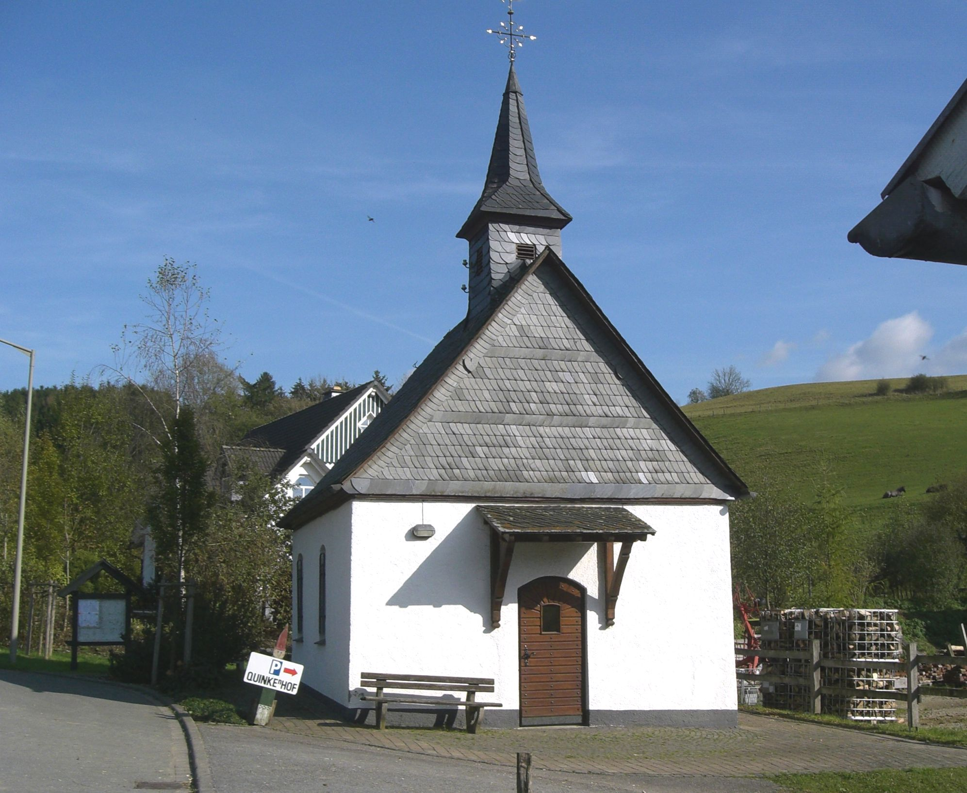 Dorfkapelle in Lennestadt-Melbecke